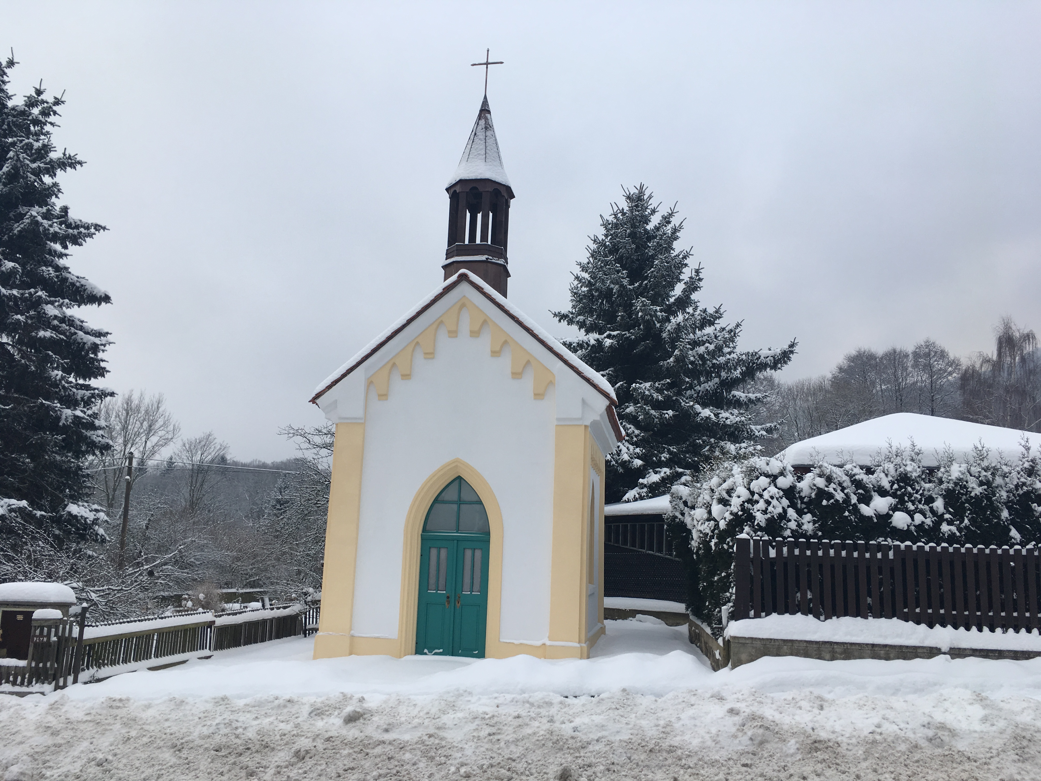 Kaple Panny Marie ve Varvažově